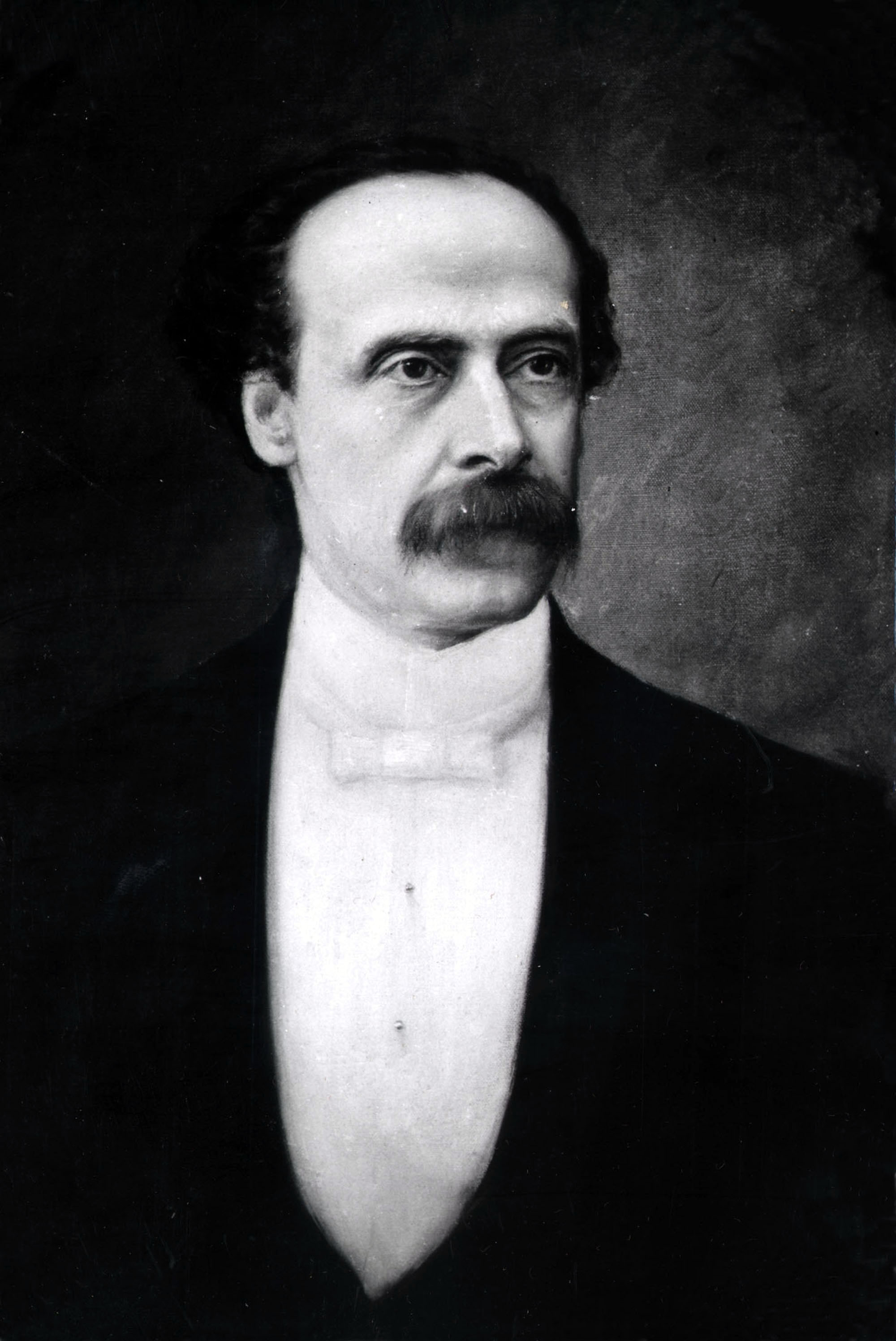 José Manuel Balmaceda Fernández (Hacienda Bucalemu; 19 de julio de 1840 - Santiago † 19 de septiembre de 1891) fue Presidente de Chile entre 1886 y 1891.